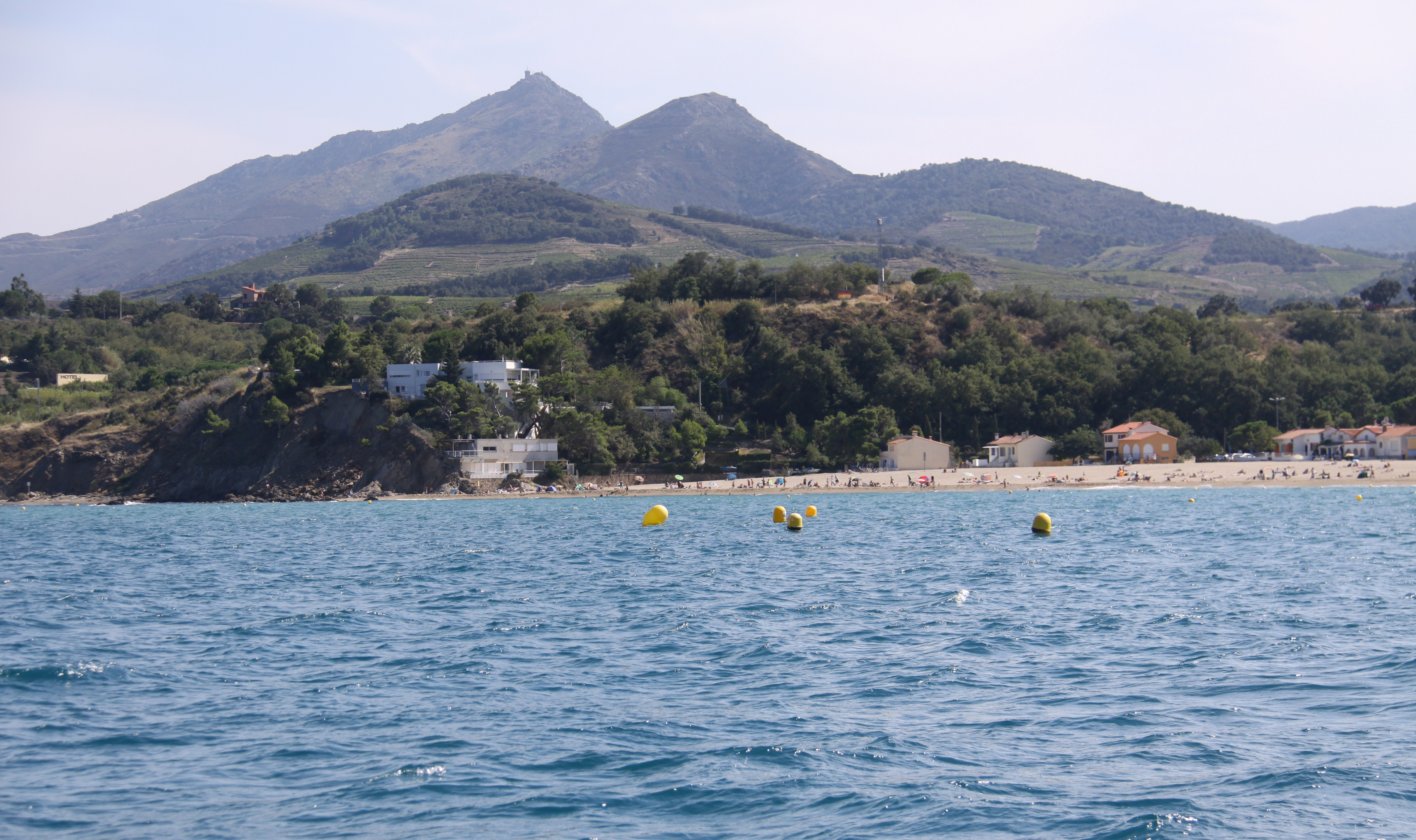 Cette photographie montre le lieu de séparation entre la côte plate (sableuse) et la côte rocheuse dans les Pyrénées-Orientales. Cette ligne de séparation est située à l' extrémité sud de la plage du Racou qui fait partie de la commune d' Argelès-sur-Mer. Au sud de cette ligne de séparation, commence la Côte Vermeille, nom donné au début de la côte rocheuse (formée par la chaine des Pyrénées qui vient se terminer dans la mer) qui se prolonge jusqu' à Roses en Alt Empordà (Catalogne). La Côte Vermeille, quant à elle, s'arrête à la Cova Foradada (la Grotte Creuse), lieu où commence le territoire espagnol. Argelès-sur-Mer, Pyrénées-Orientales, France.